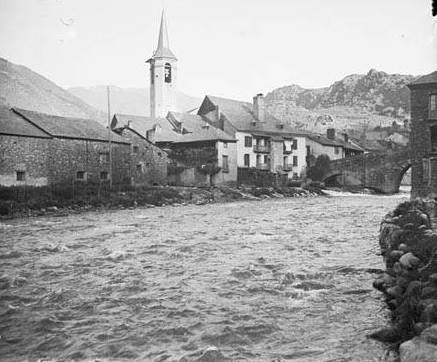 Imatge